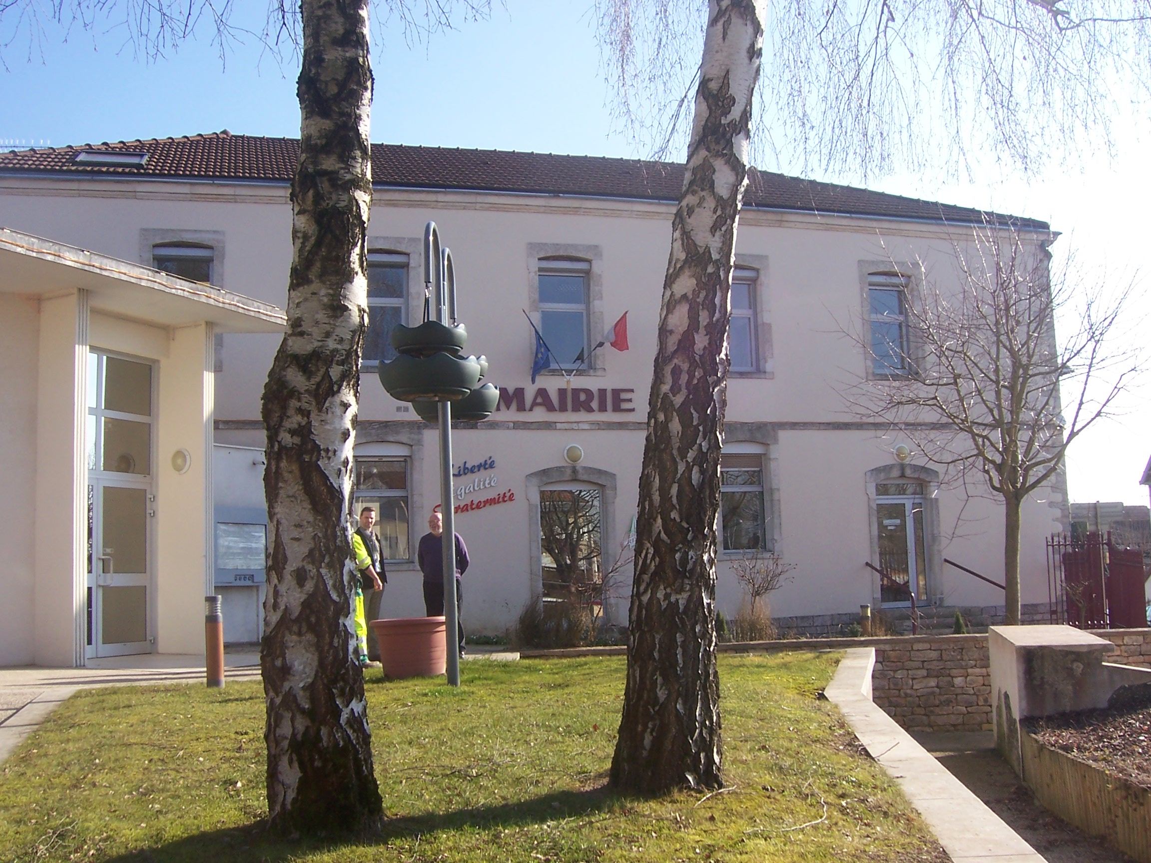 Mairie de Crissey